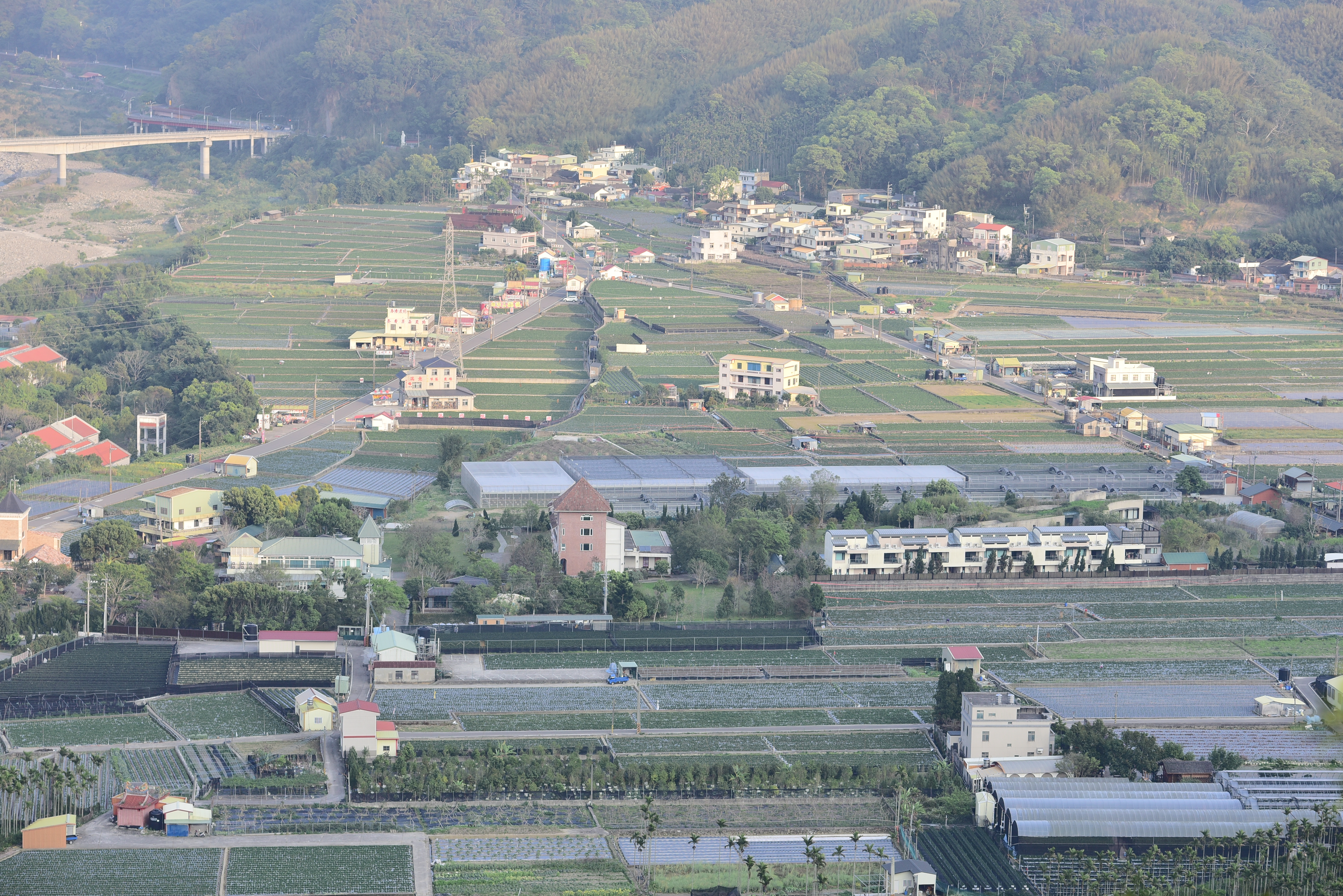 Dahu Township, Miaoli County, Taiwan